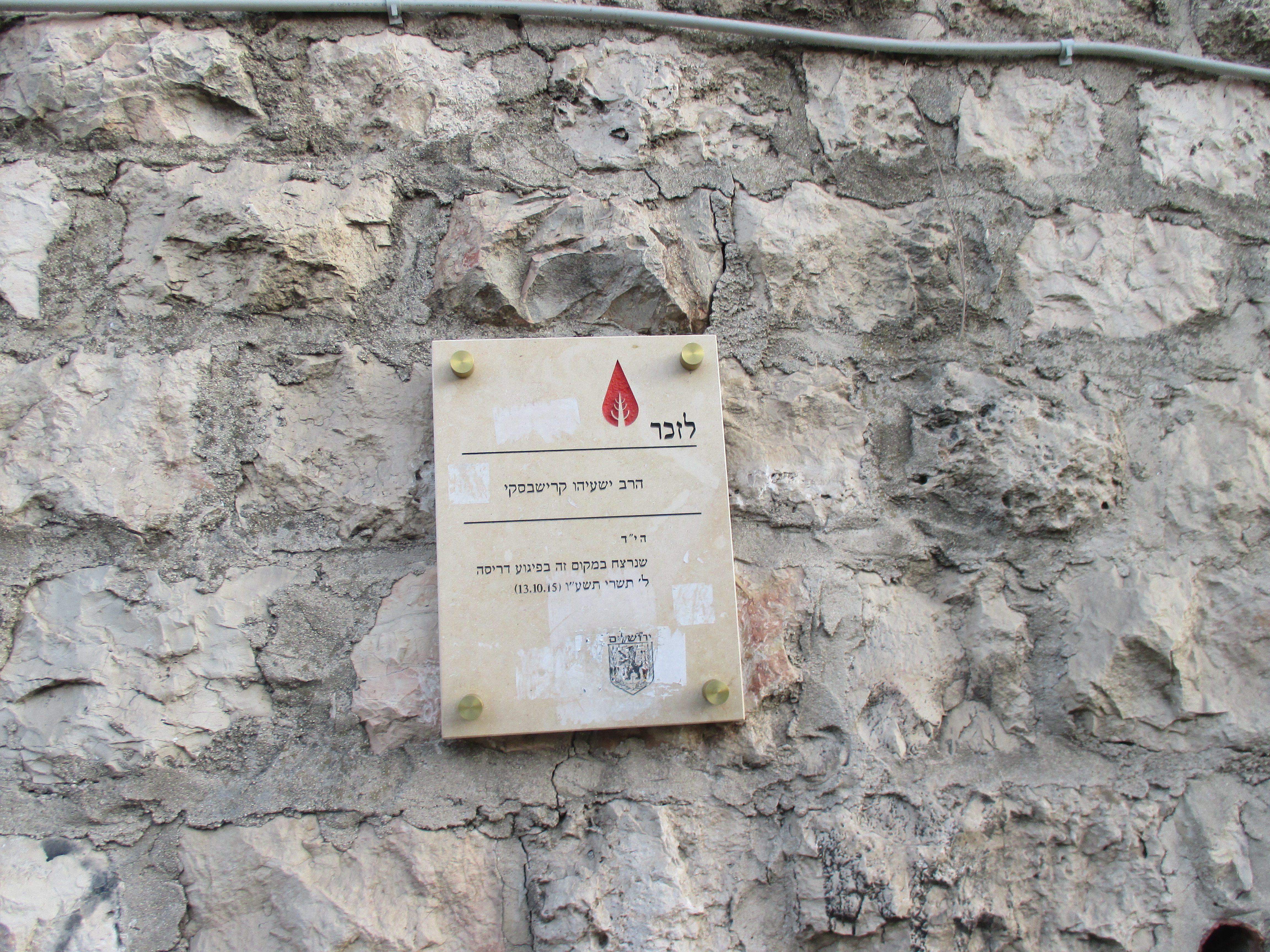 לוח זיכרון לישעיהו קרישבסקי במקום הפיגוע